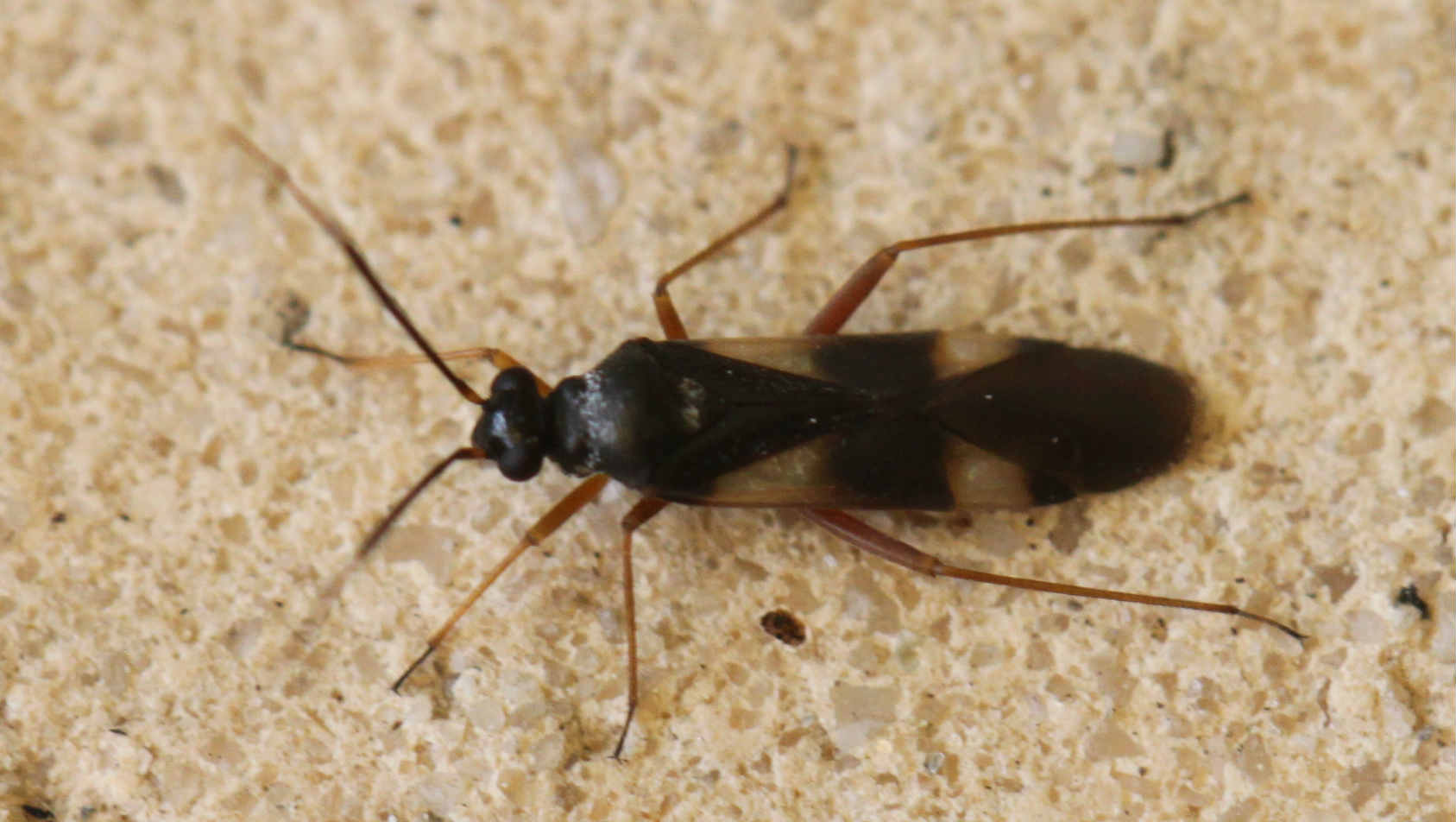 Globiceps fulvicollis, Männchen, am 16.6.2017 in Oftersheim - südlich von Mannheim